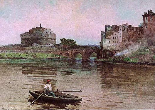 Castel Sant'Angelo in Rome (rione Borgo)